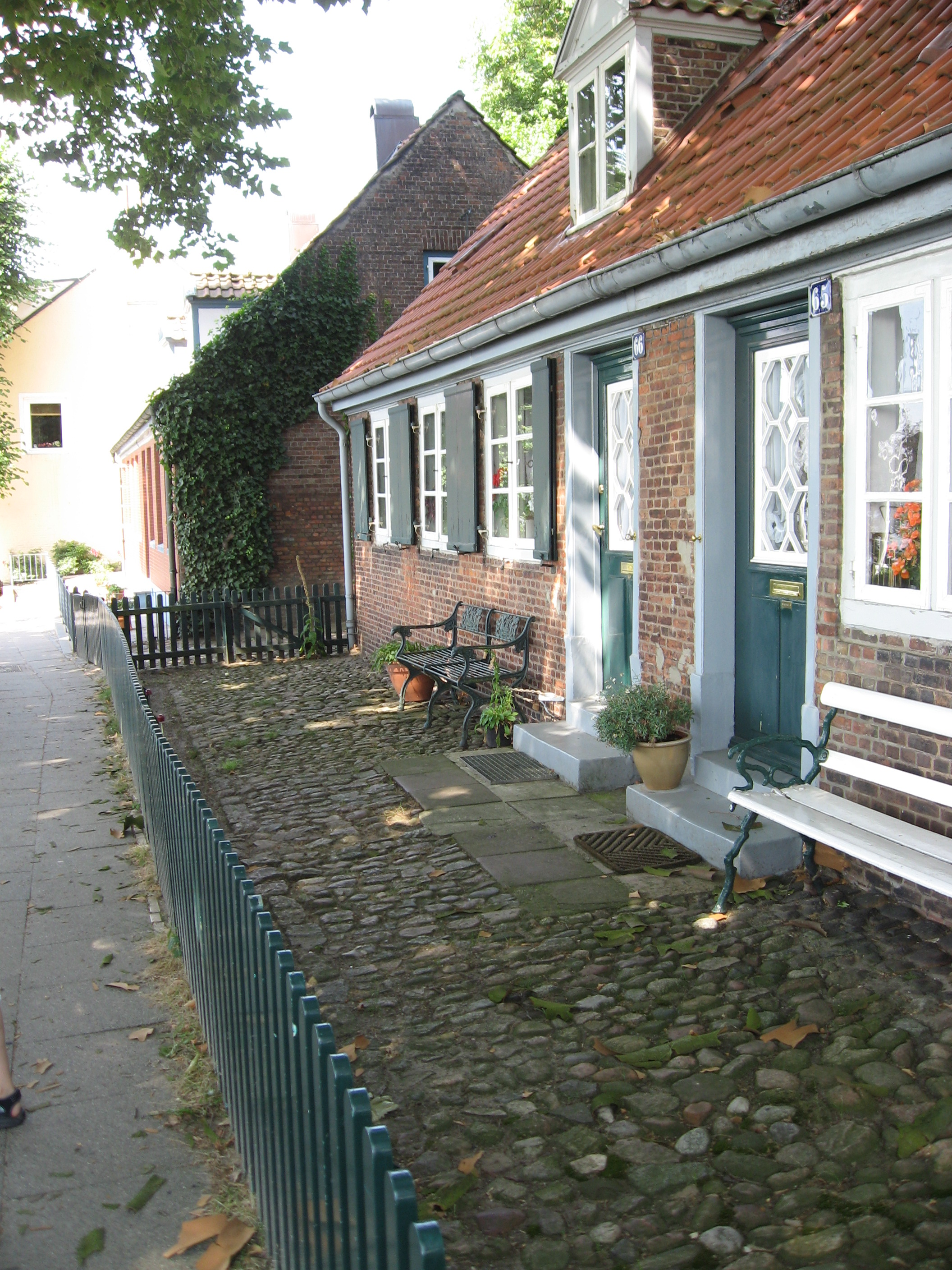 Weg an der Övelgönne 1